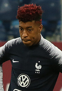 Звёзды сборной Франции готовятся к матчу с Россией